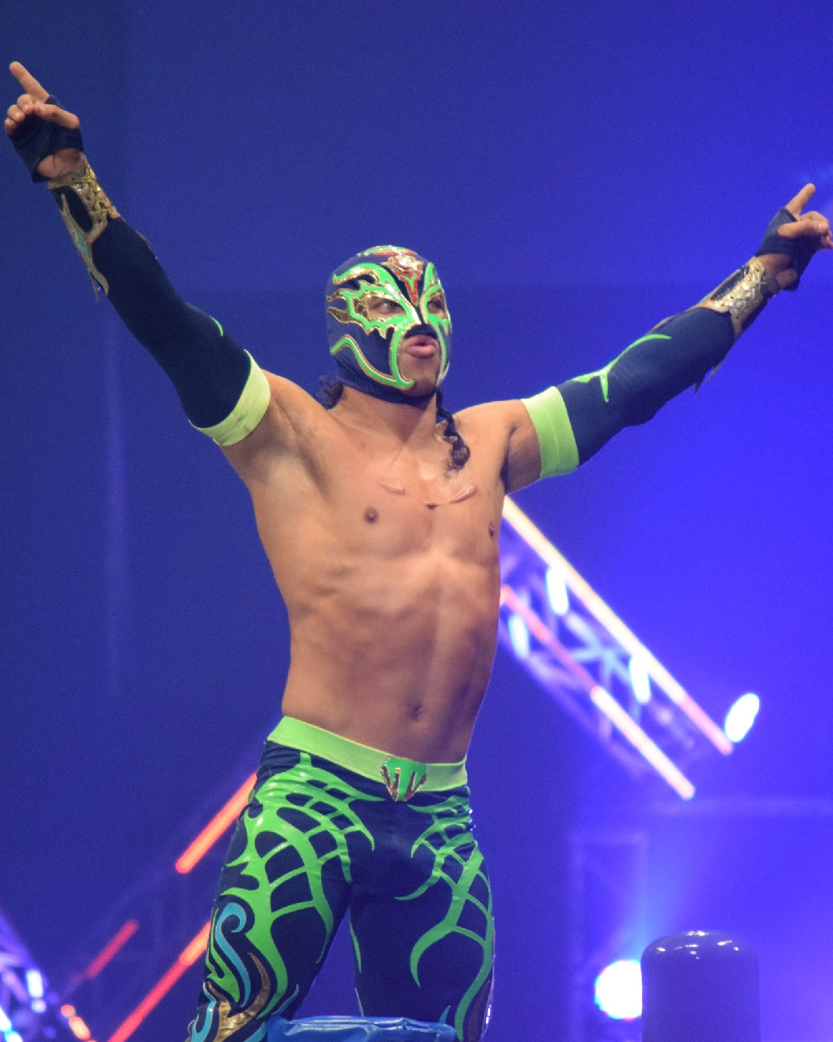 2016年11月5日 大阪府立体育会館「POWER STRUGGLE」 ティタン